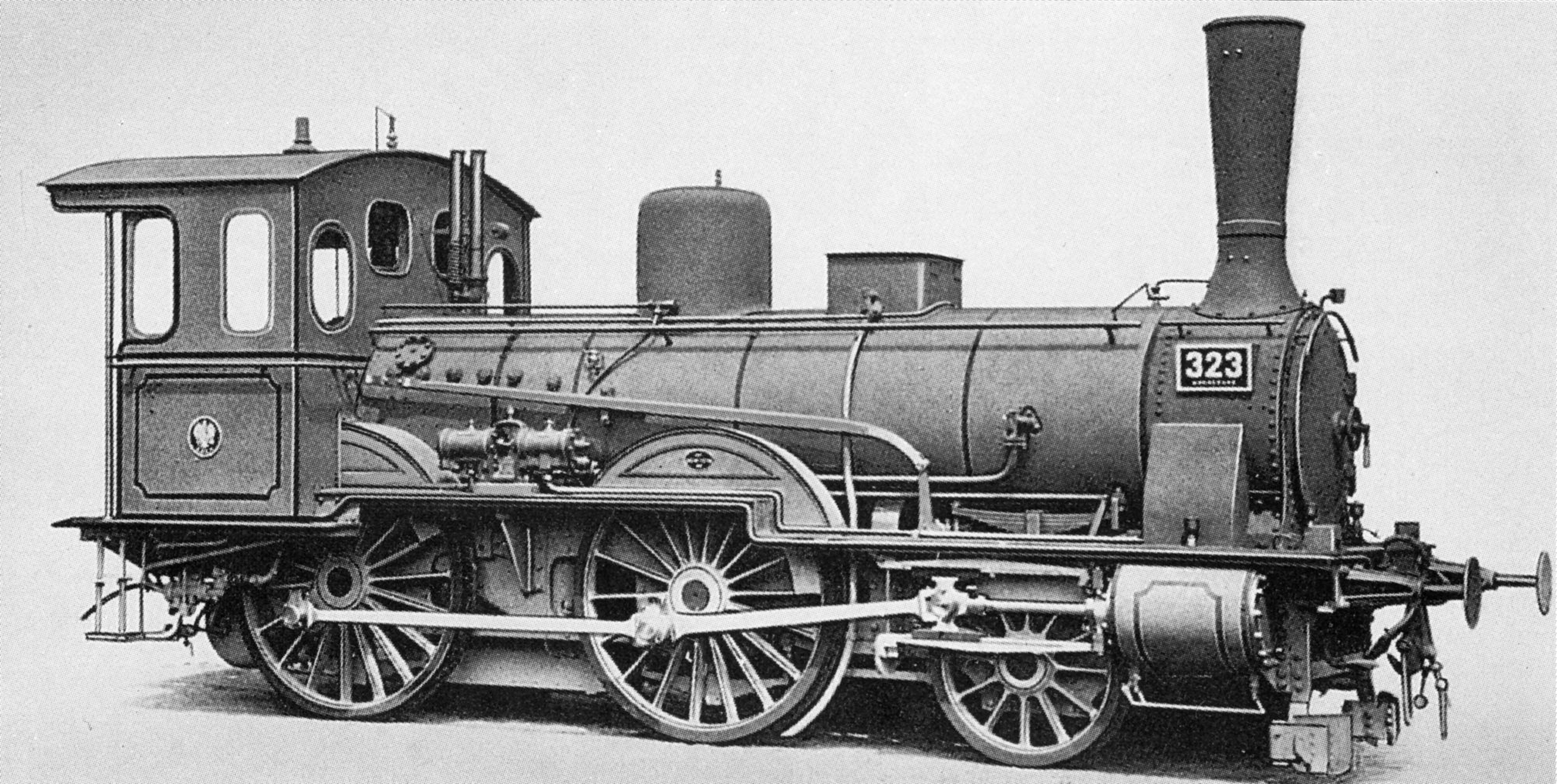 Dampflokomotive Preußische P3.1.